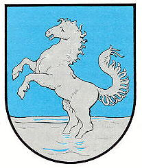 Wappen von Zweibrücken-Hengstbach Source: K.-H. Debus: Das grosse Wappenbuch der Pfalz. Gräber, Neustadt an der Weinstrasse, 1988. 392 p. ISBN 3-9801574-2-3. /